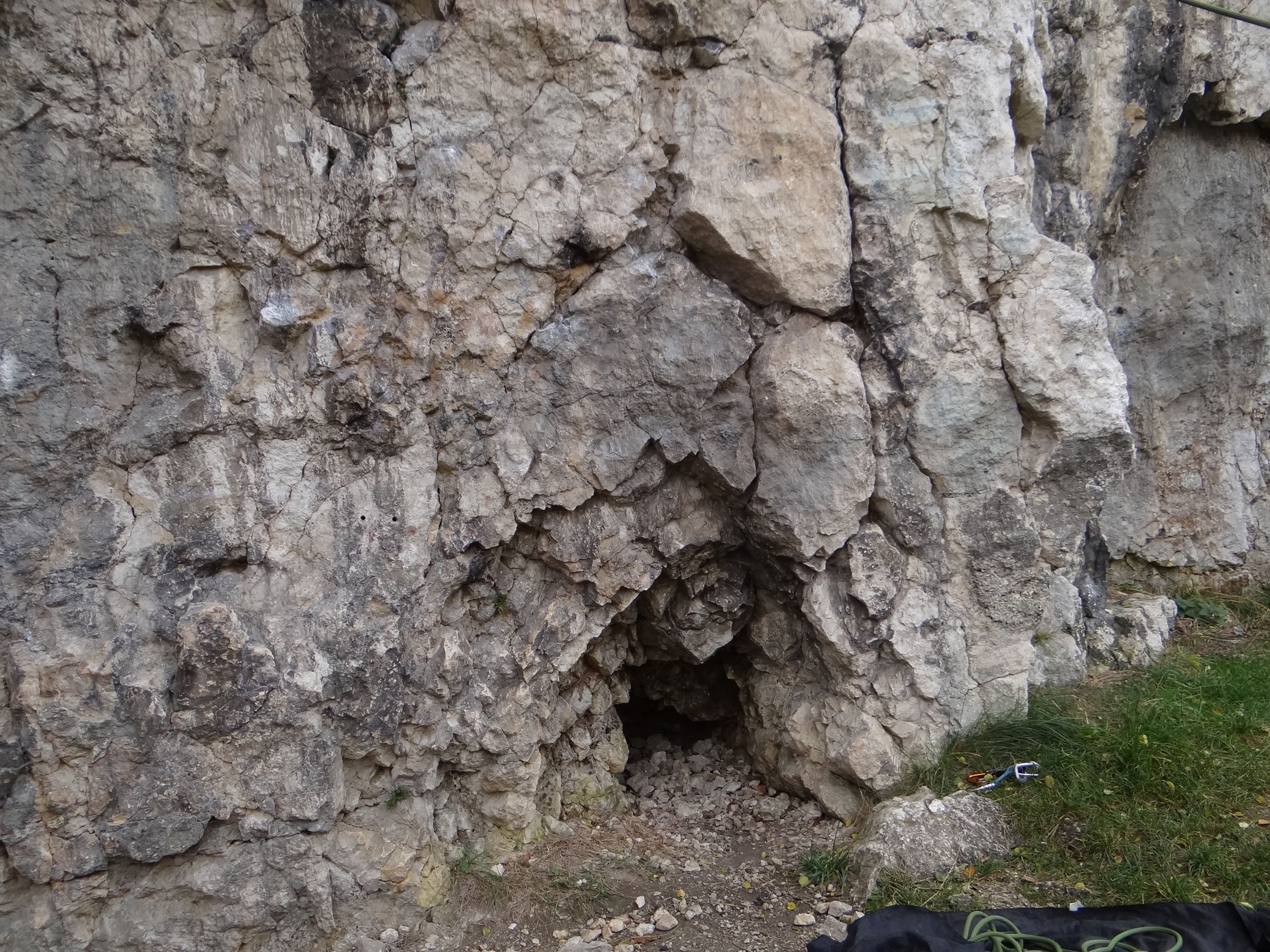 Zawalony gruzem otwór północny Jaskini Koguta na Zakrzówku w Krakowie